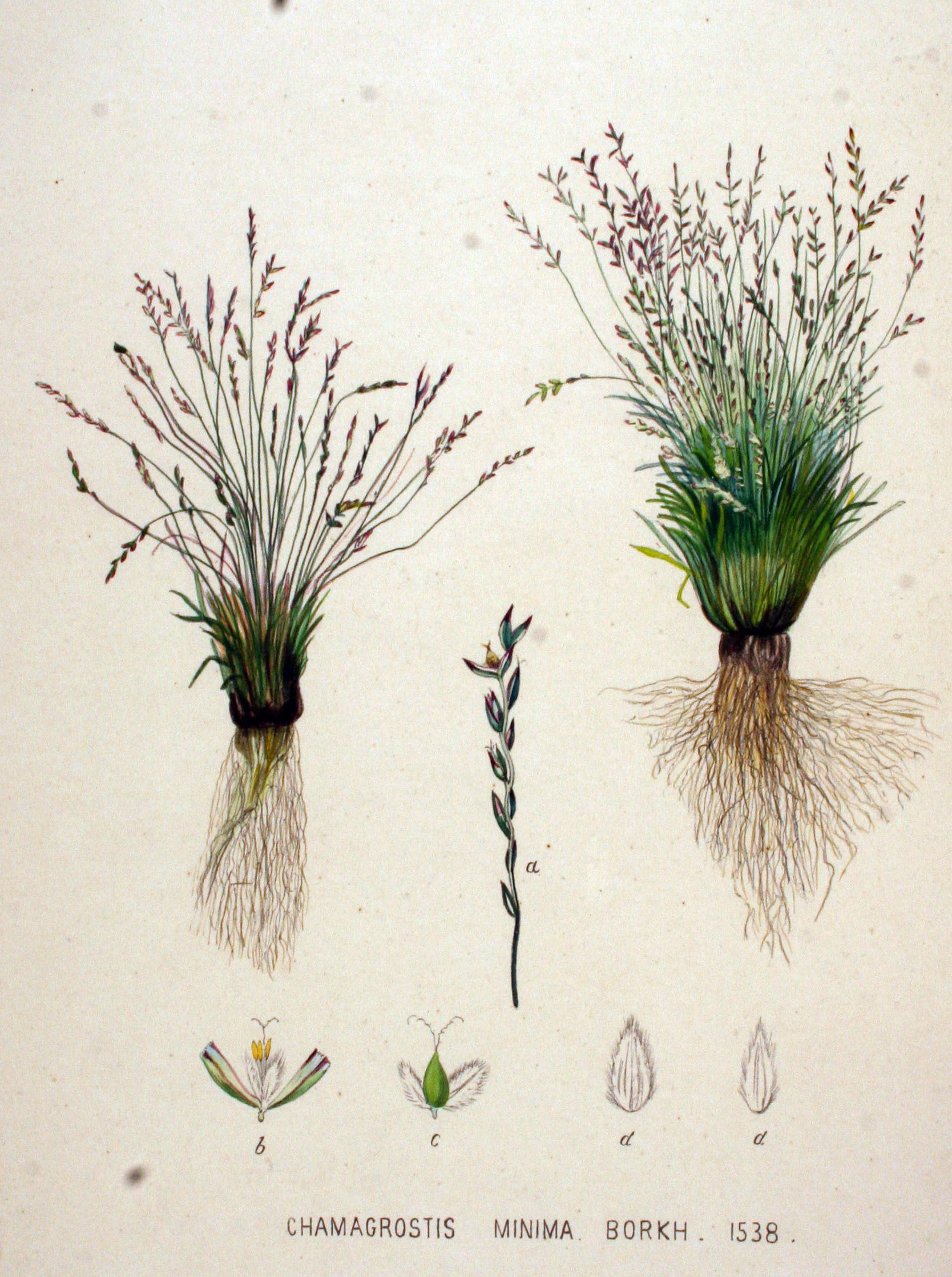 Mibora minima (L.) Desv. (Syn. Chamagrostis minima (L.) Borkh. ex Wibel)